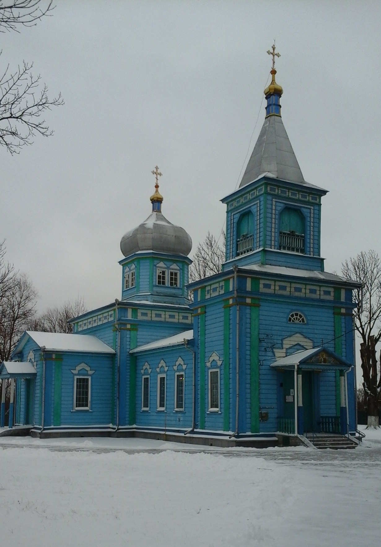 Свято-Миколаївська церква в м. Дубровиця, Рівненська область, Україна